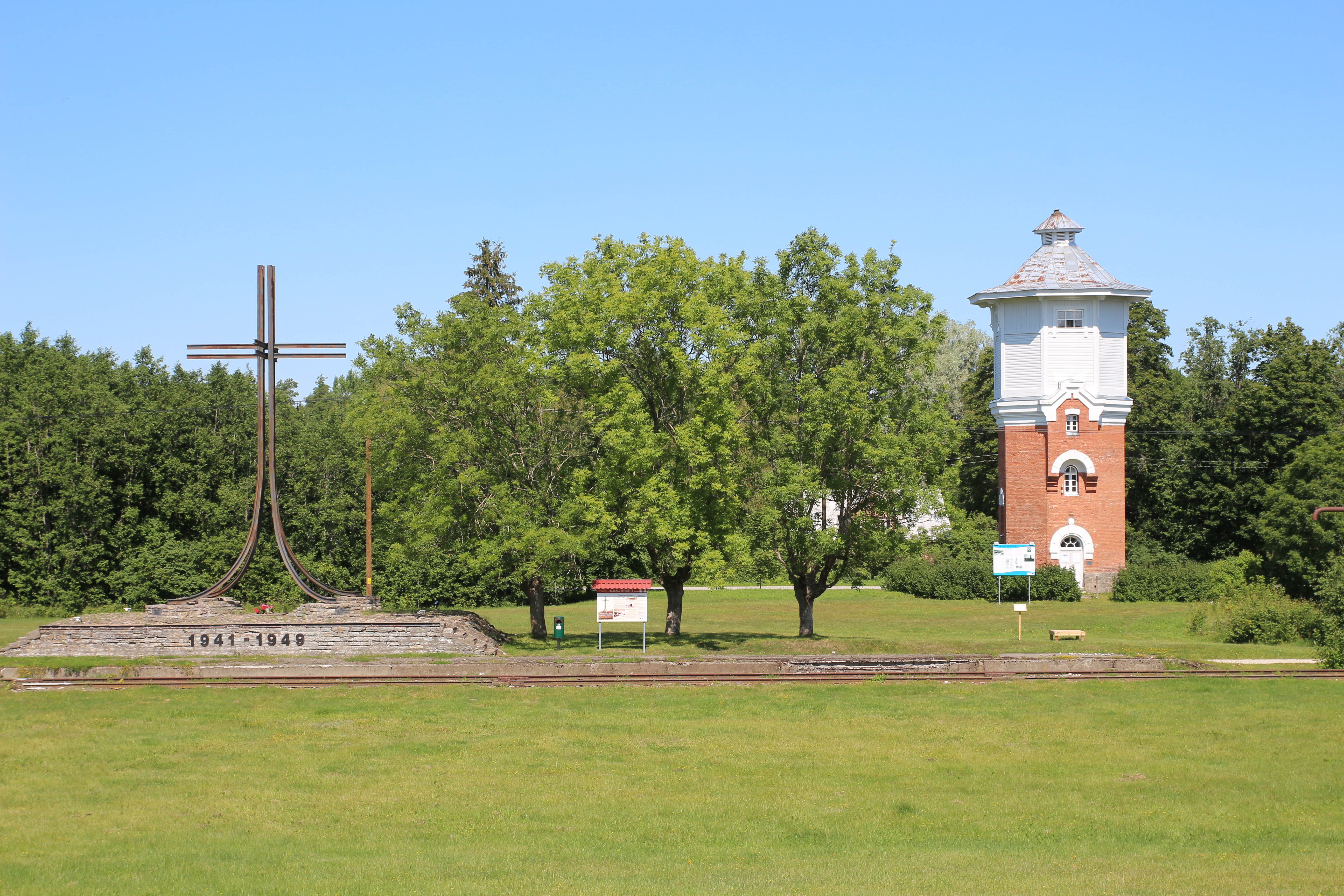 Risti raudteejaamakompleks